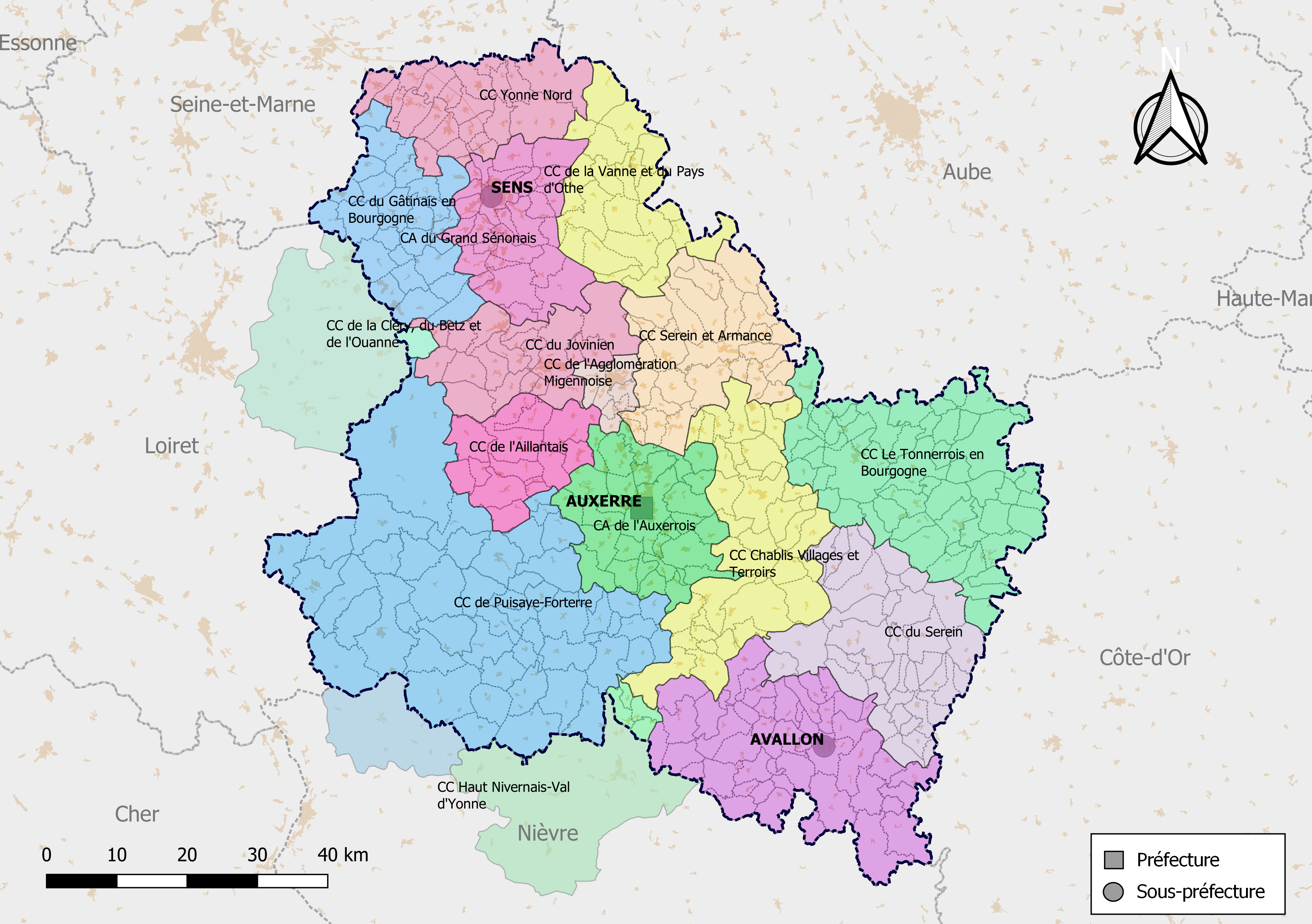 Carte des intercommunalités du département de l'Yonne, France. Composition au 1er janvier 2019.